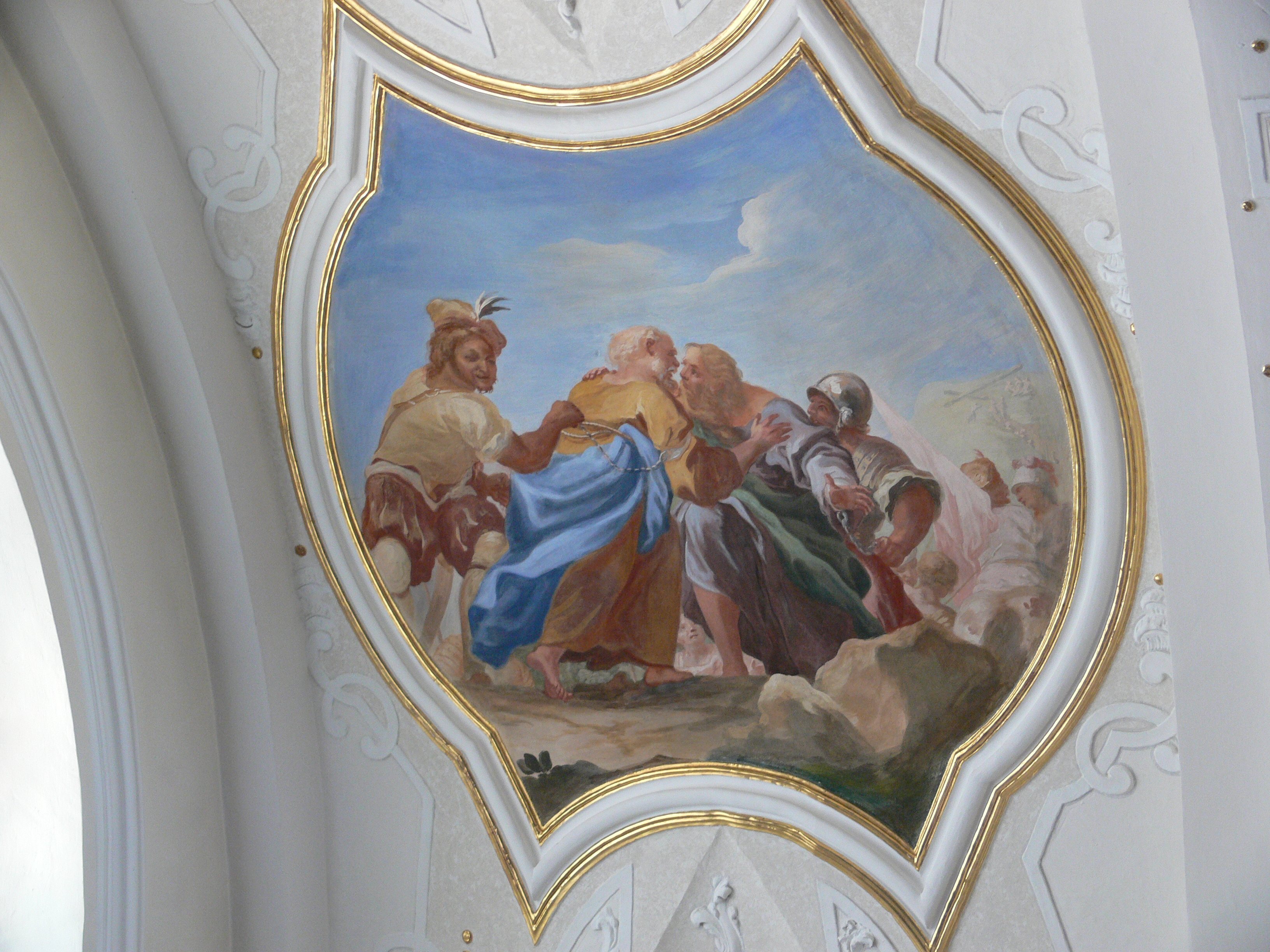 Pfarrkirche St. Peter (ehem. Klosterkirche St. Peter auf dem Schwarzwald) Fresken von Franz Joseph Spiegler, 1727 (restauriert, teilweise verändert und um Schriftzüge ergänzt: 1873/74) "Abschied Petri und Pauli"